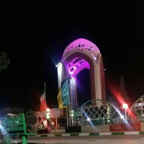 یادبود گلزار شهدا زیباشهر